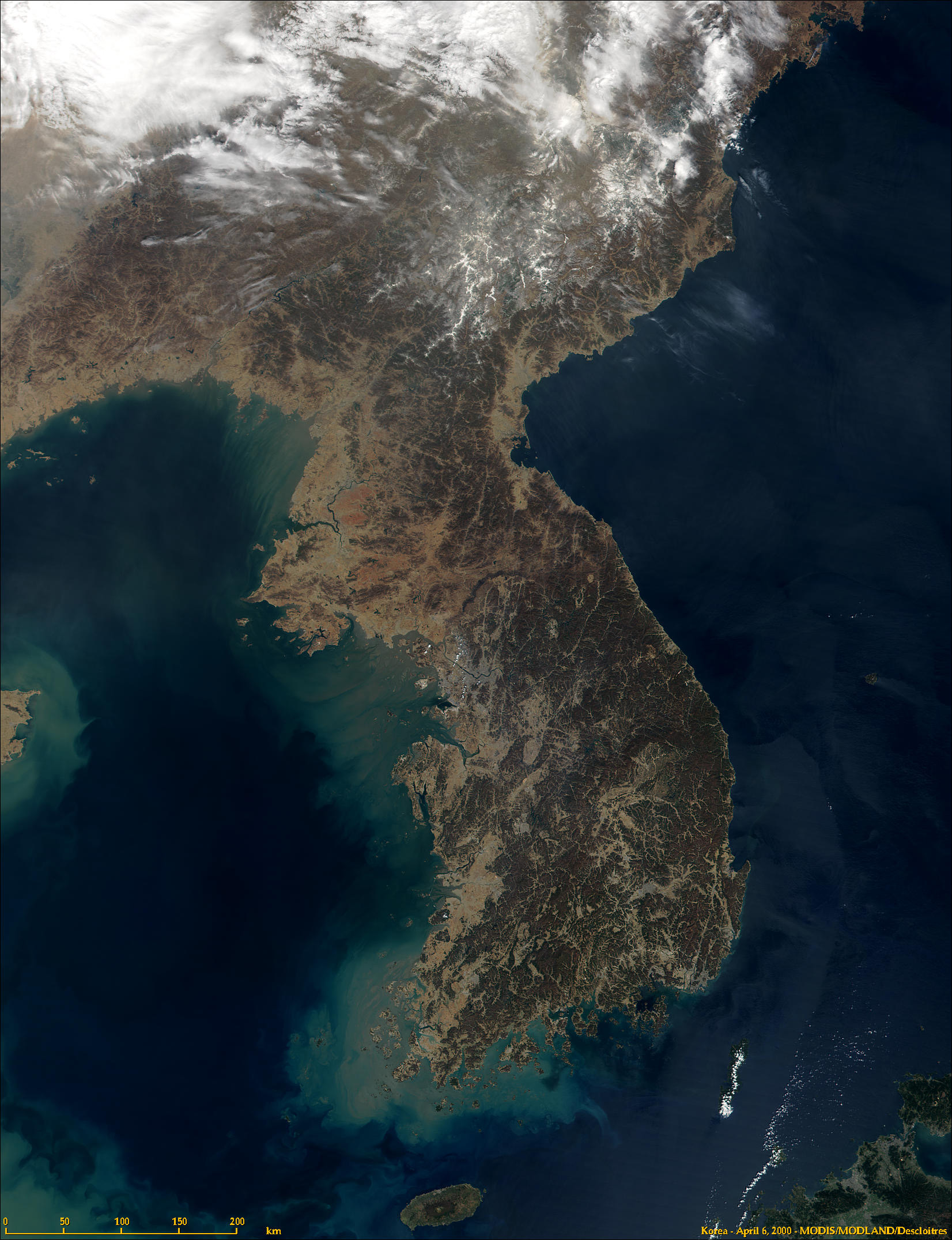 Korea vanuit de satelliet.